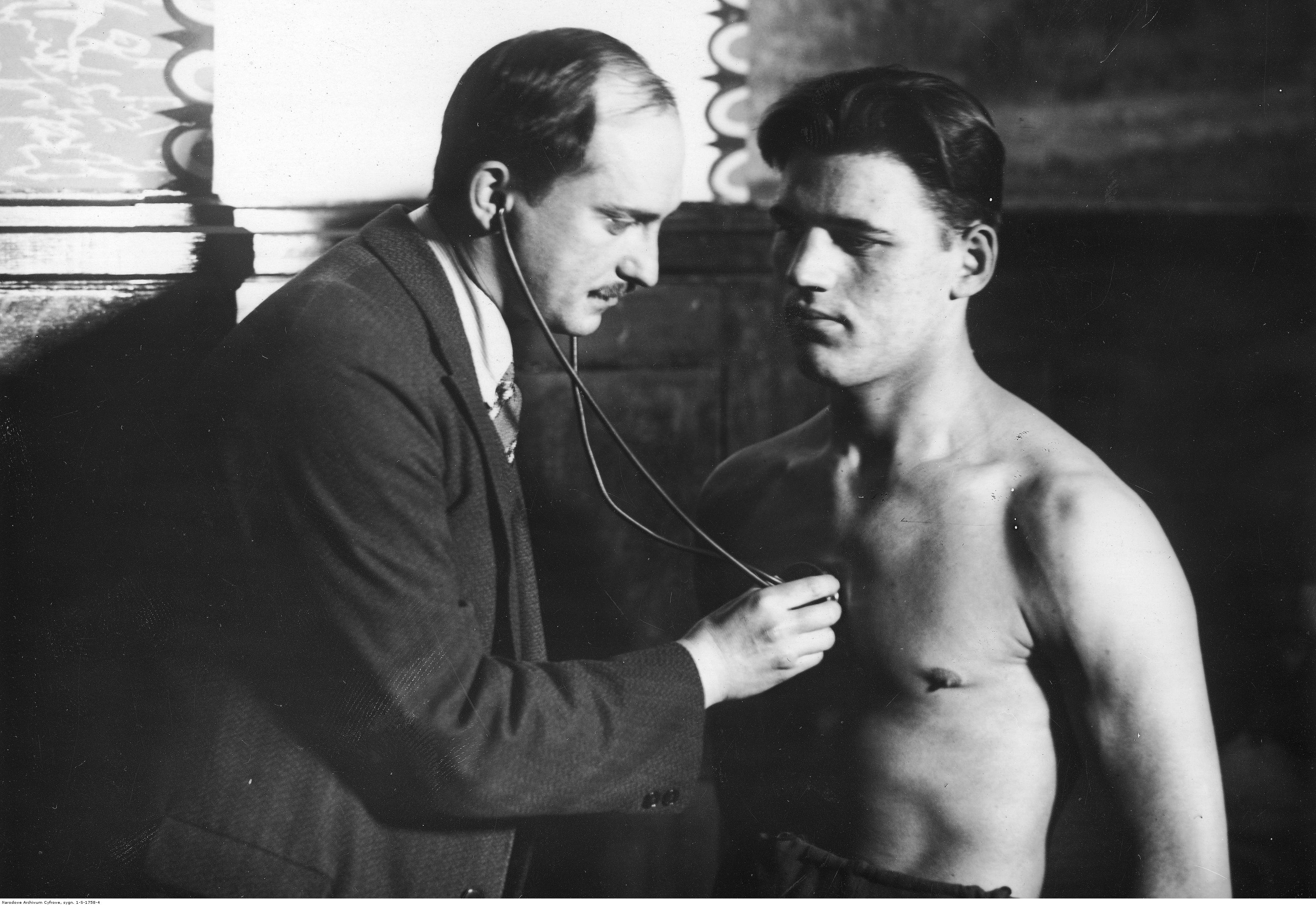 Lekarz Hieronim Schulz bada przed walką boksera wagi ciężkiej Christowskiego